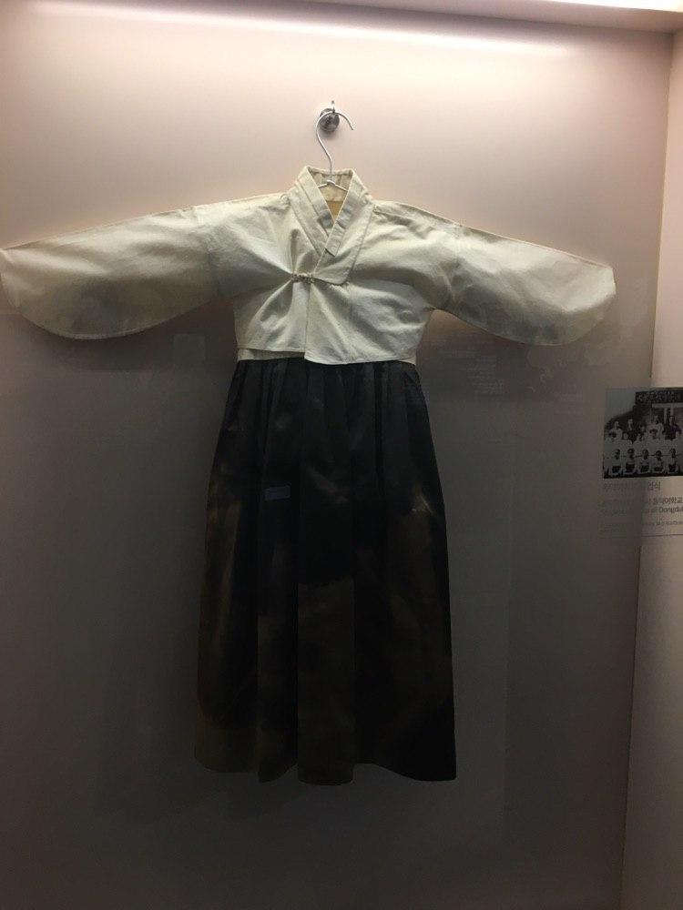 동덕여학교 교복